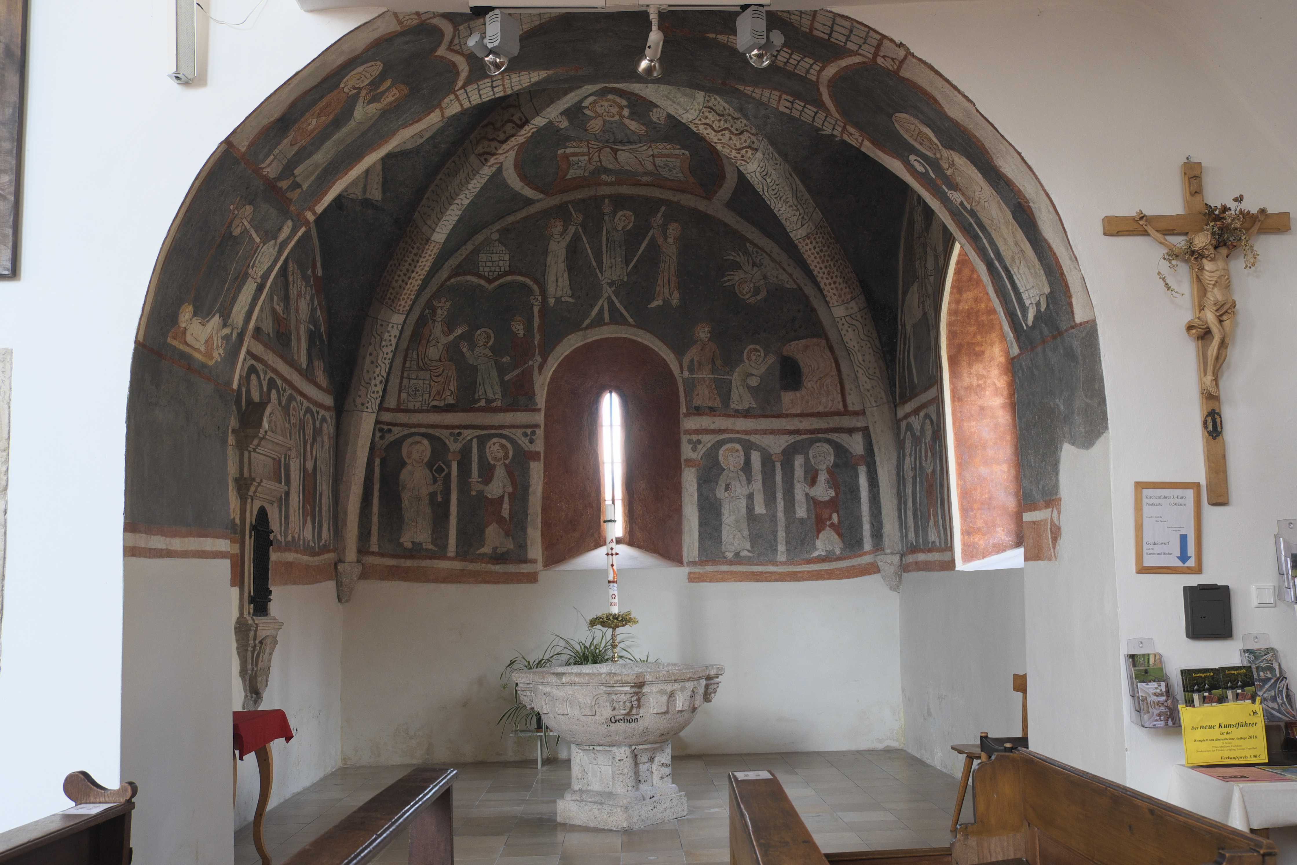 Katholische Pfarrkirche St. Vitus in Kottingwörth (Beilngries) im oberbayerischen Landkreis Eichstätt (Bayern/Deutschland), Wand- und Deckenmalereien in der Vituskapelle, in Fresko- und Seccotechnik, wohl nach 1313 entstanden